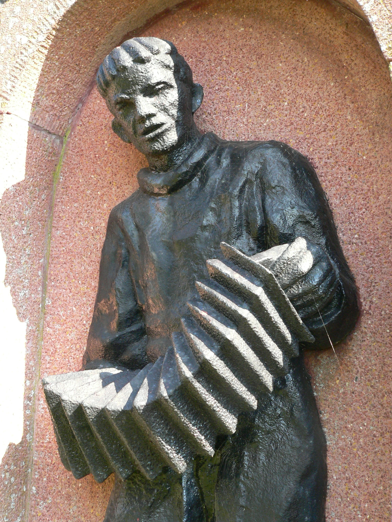 Grabmal von Max Koecke-Wichmann